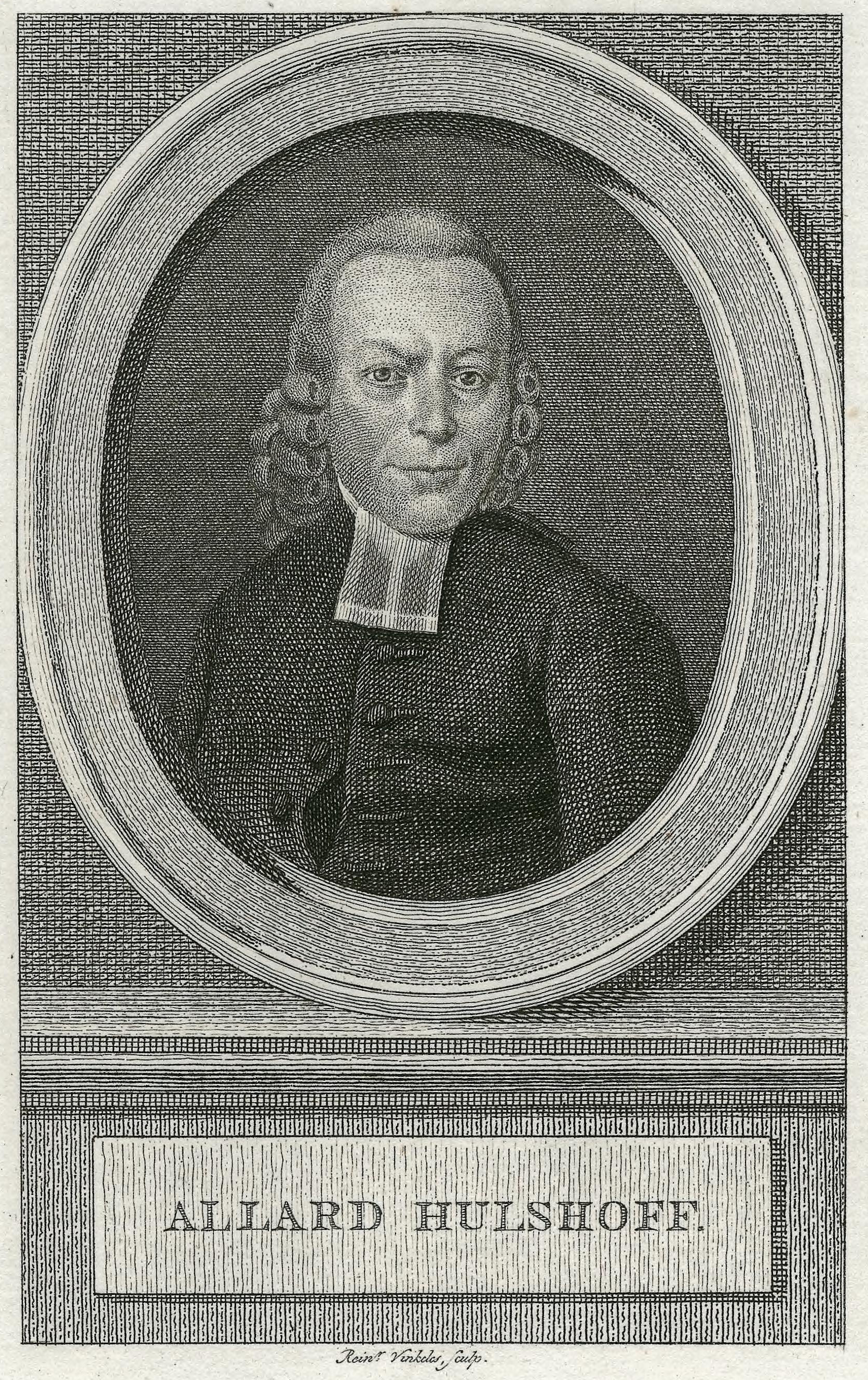 Portret (ets) van Allard Hulshoff, Nederlands doopsgezind predikant in Amsterdam